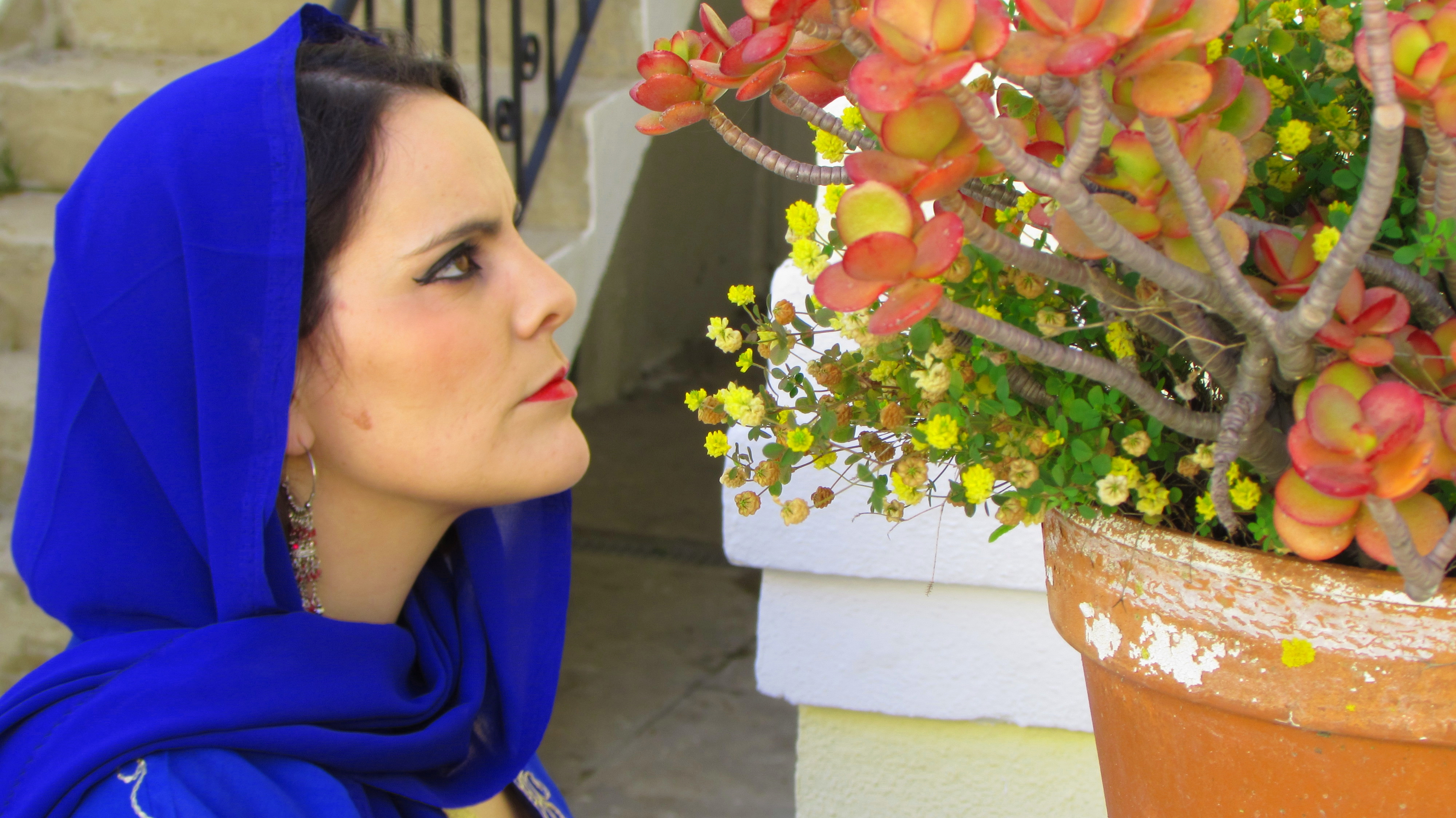 A personagem Zhaida, interpretada por Margarida Camacho no espectáculo Eu Sou Mediterrâneo.